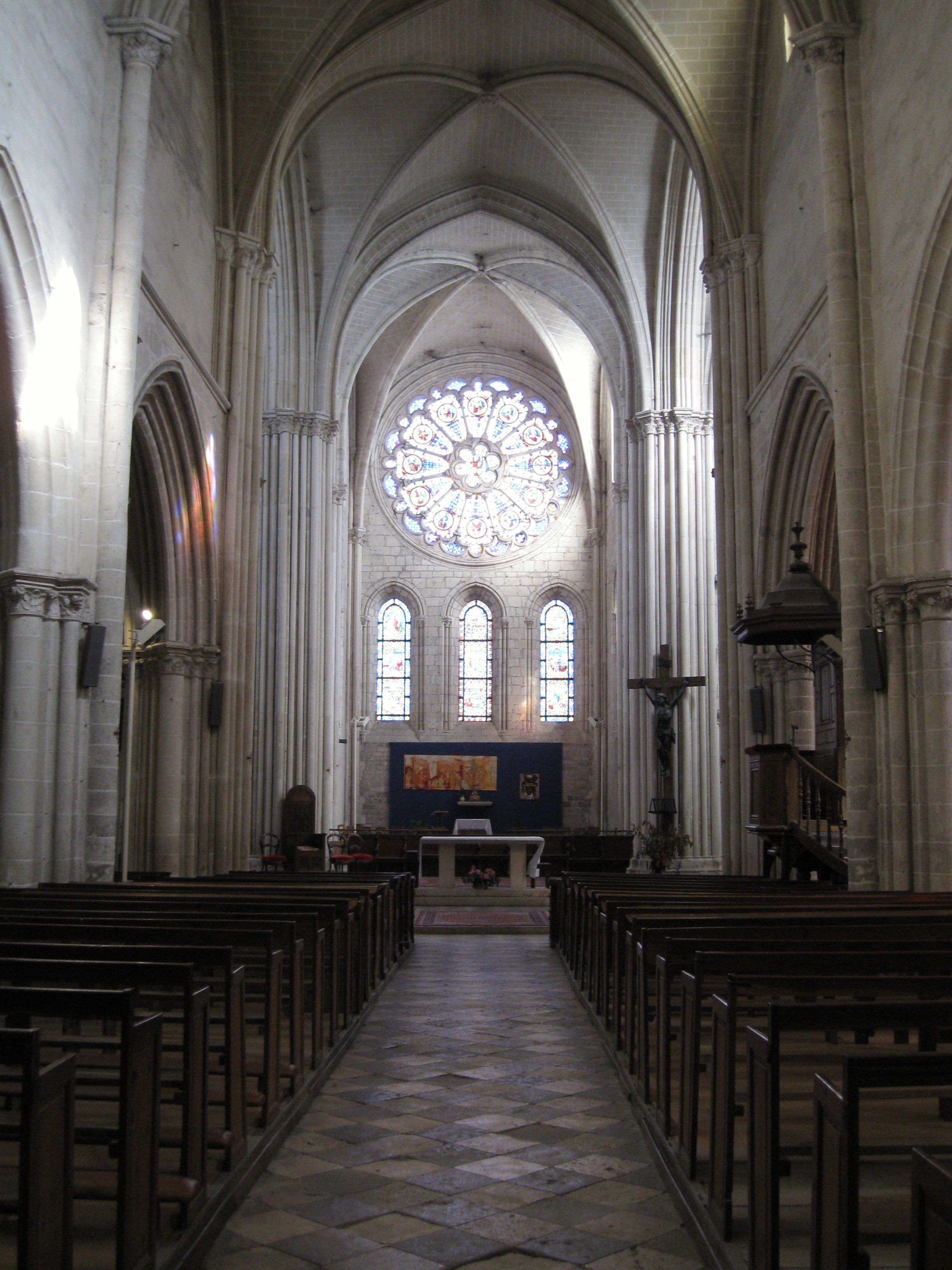 Église Saint-Pierre de Chécy, Loiret, France